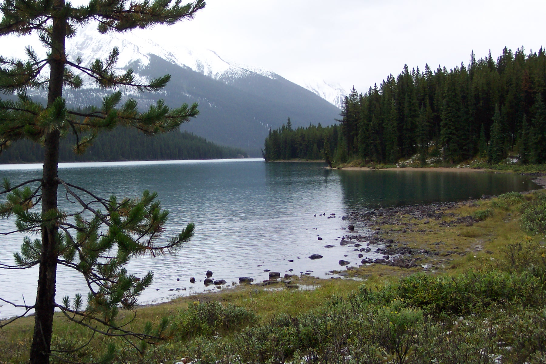 Canada Rocheuses Jasper lac Maligne photo personnelle libre de droits - free license picture